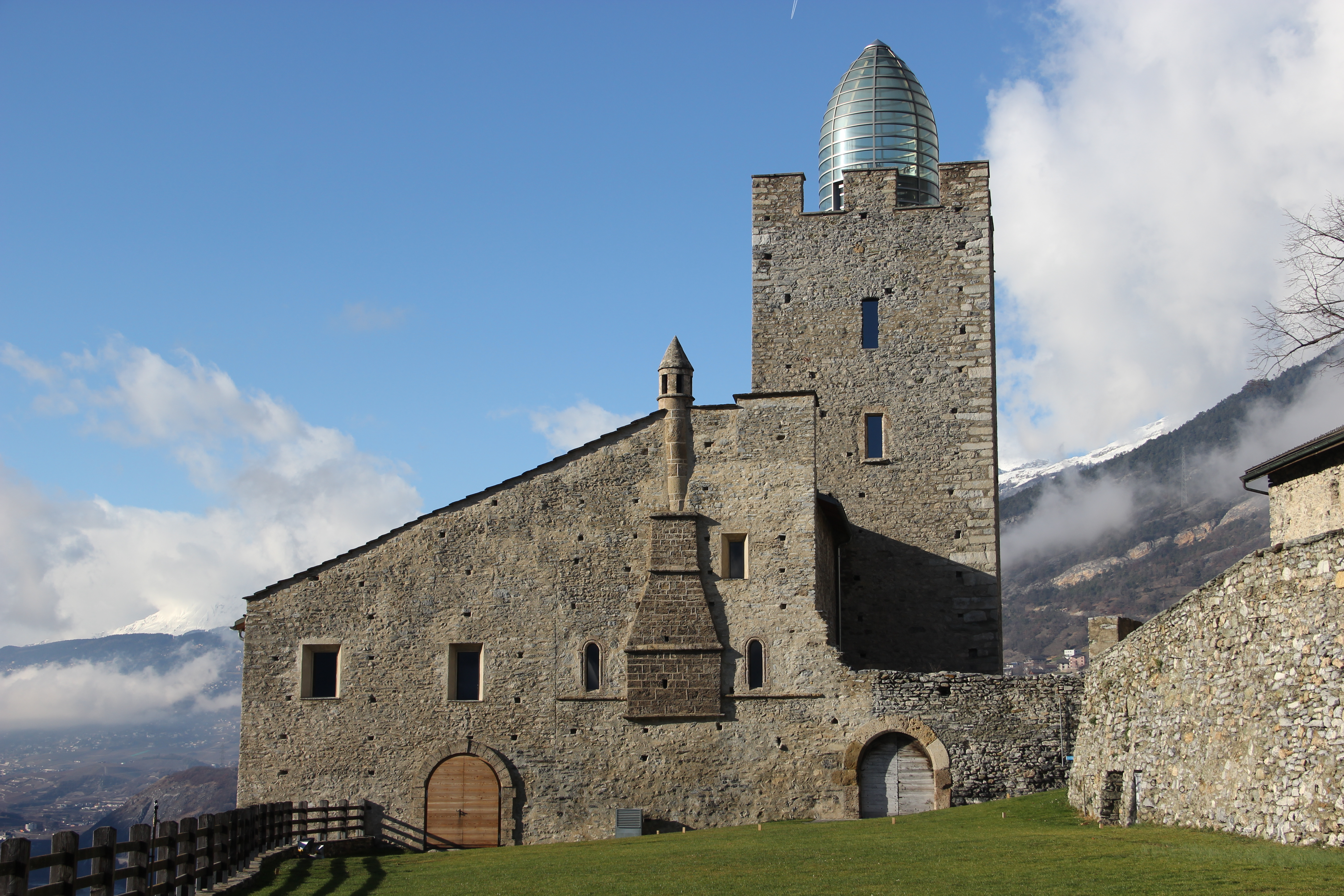 Bischofsschloss Leuk